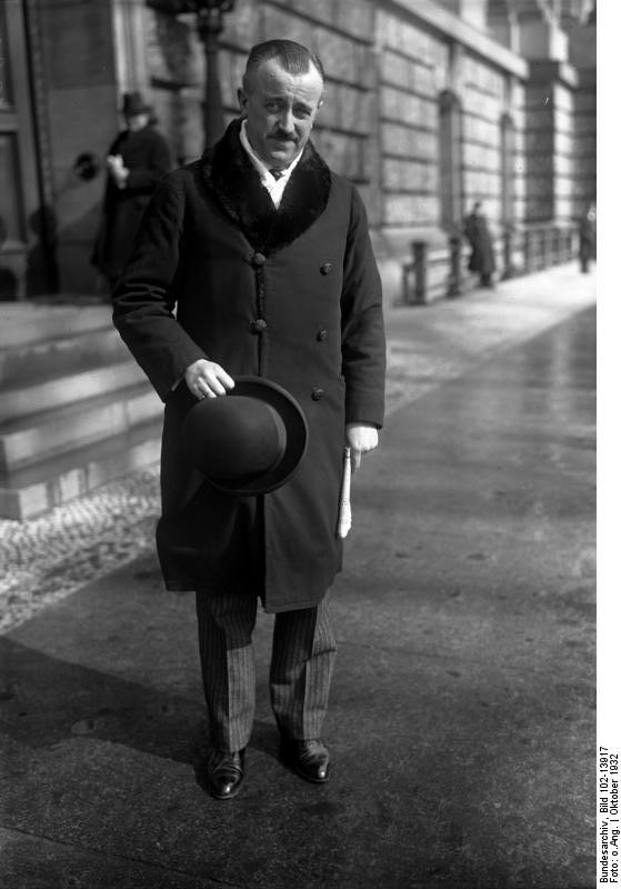 Staatssekretär Dr. Pünder, wurde zum Regierungspräsidenten in Münster ernannt ! Staatssekretär Dr. Pünder, welcher nach Münster als Regierungspräsident geht, war ein Mitarbeiter des ehemaligen Reichskanzlers Dr. Brüning in der Reichskanzlei.